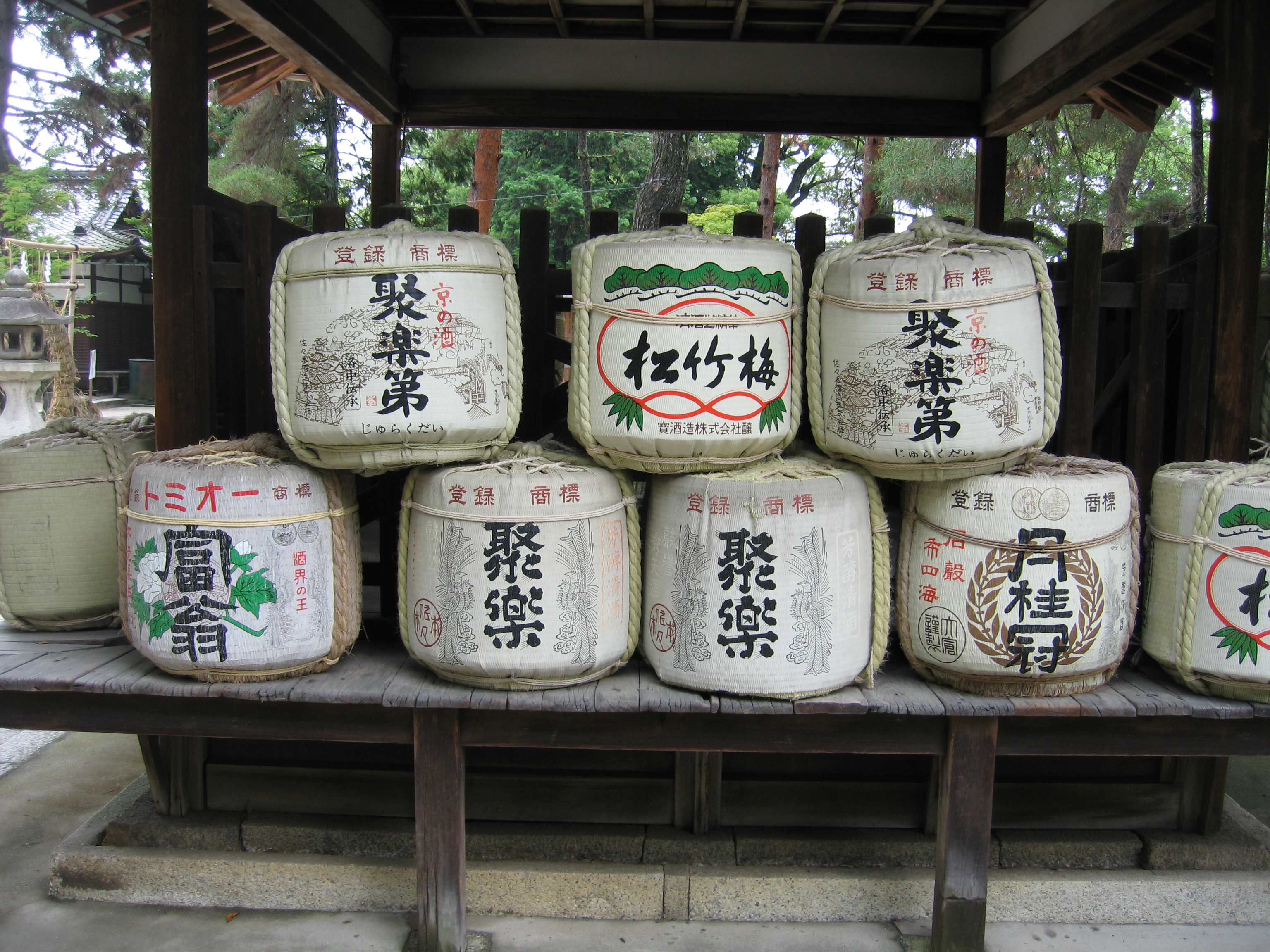 Sake Barrels